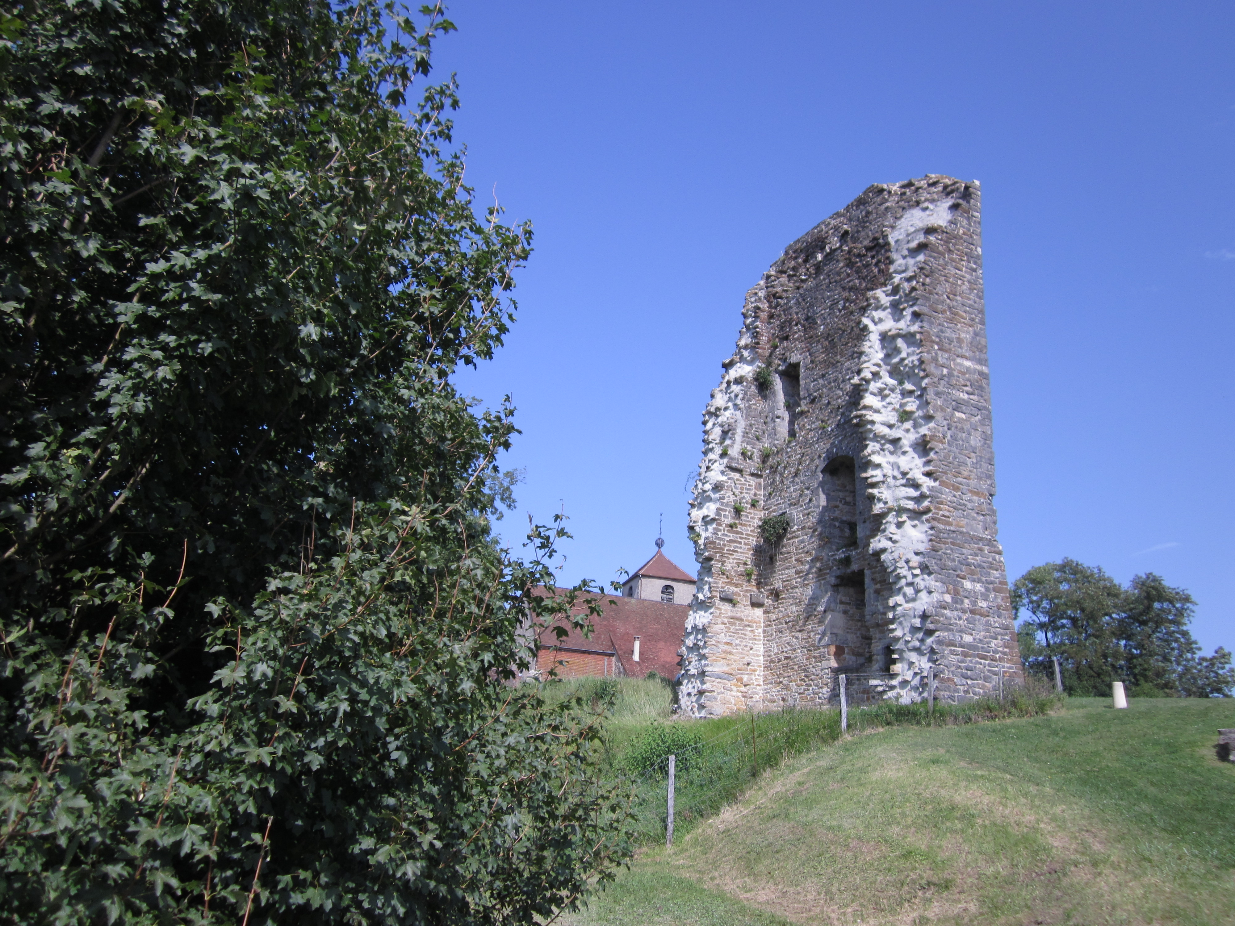 Toulouse-le-Château (Jura)- ruines du château et église